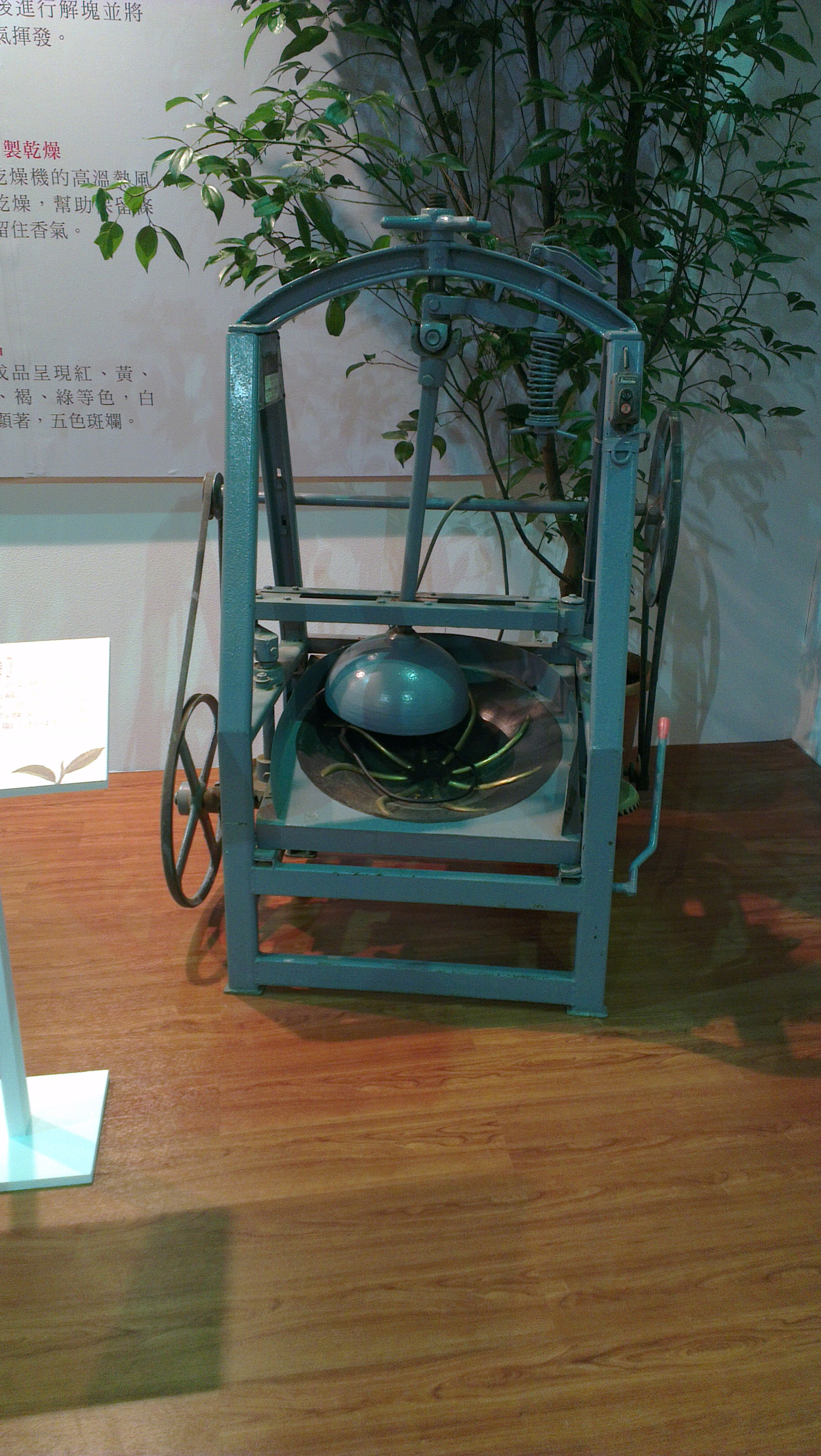 中文（台灣）: 茶葉揉捻機械